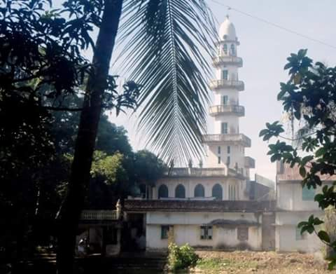 ধর্মীয় প্রতিষ্ঠান